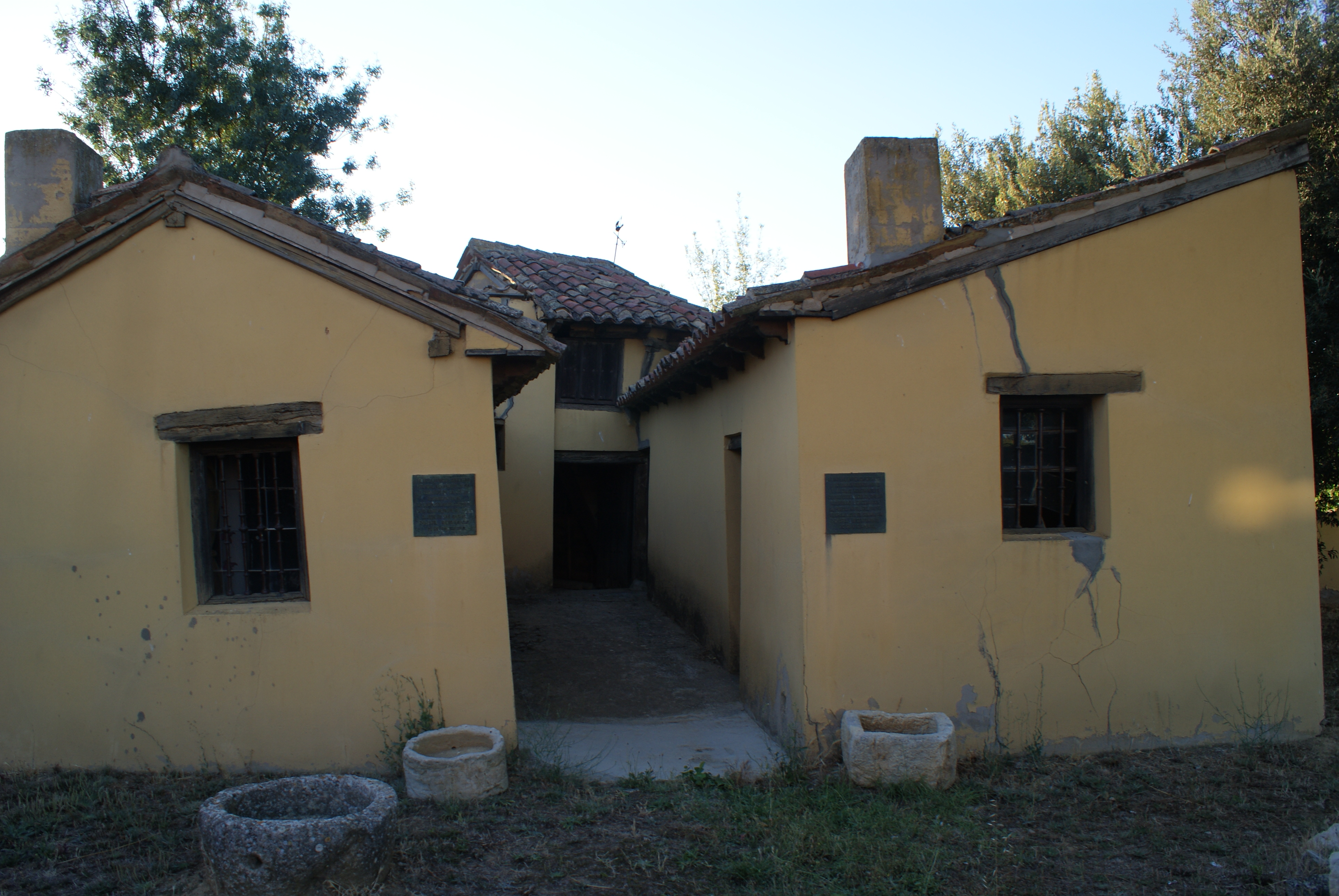 Vista exterios de la casa de los padres del General San Martín, ubicada en Cervatos de la Cueza (provincia de Palencia, España).